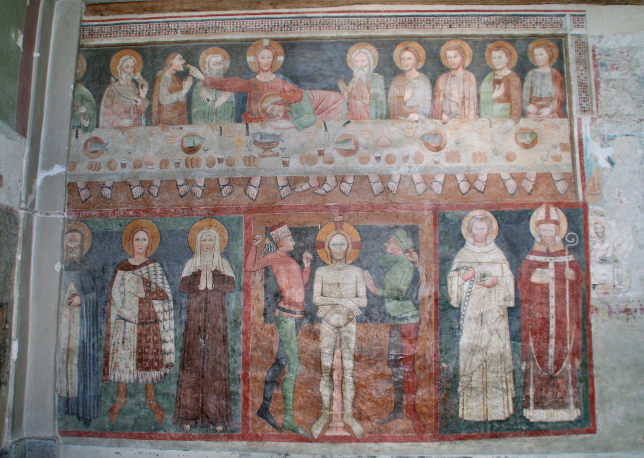 Kirche Santi Lorenzo e Agata : Fresko, 14. Jhd.